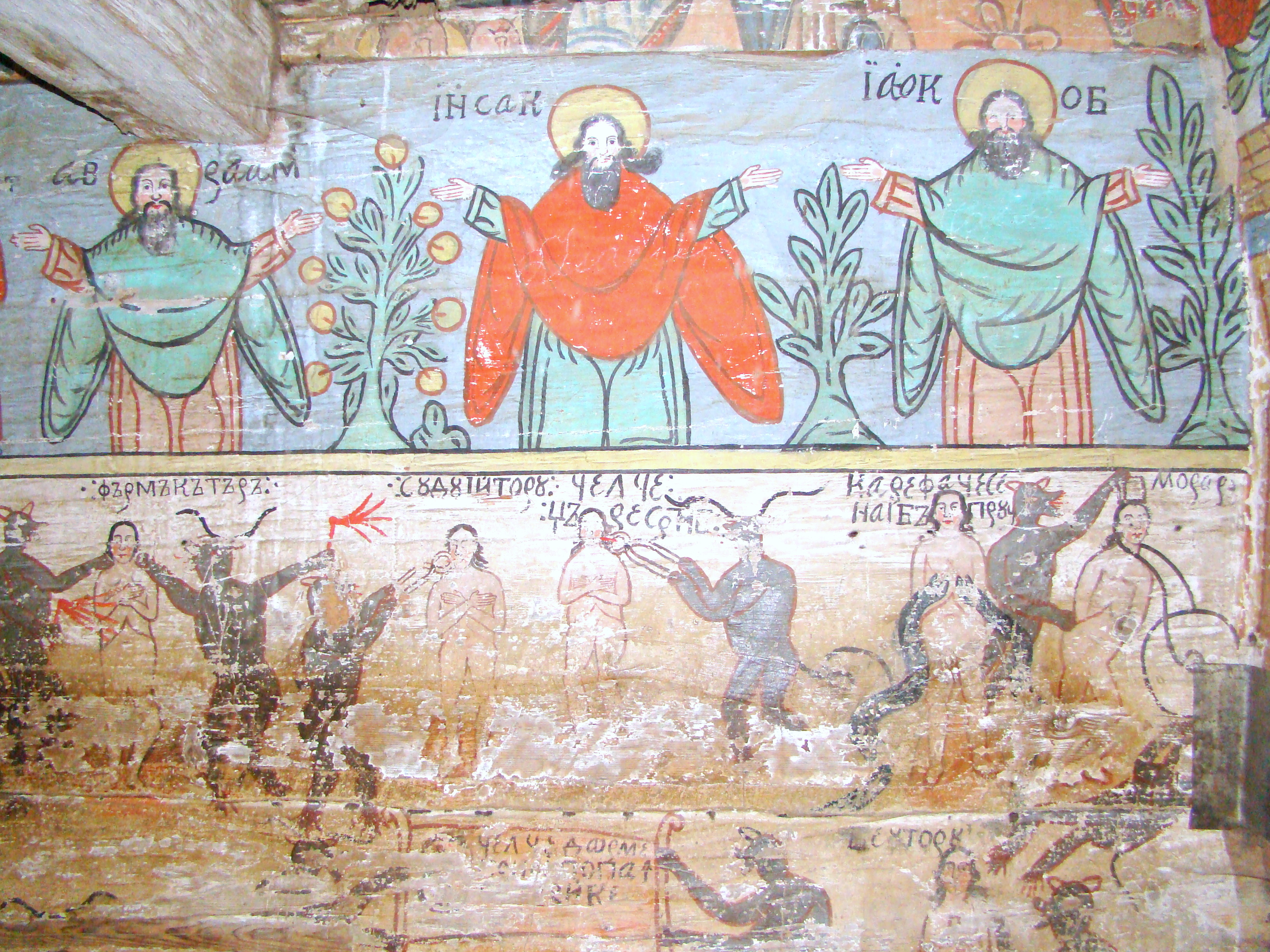 Biserica de lemn „Sf.Dumitru” din Larga, județul Maramureș